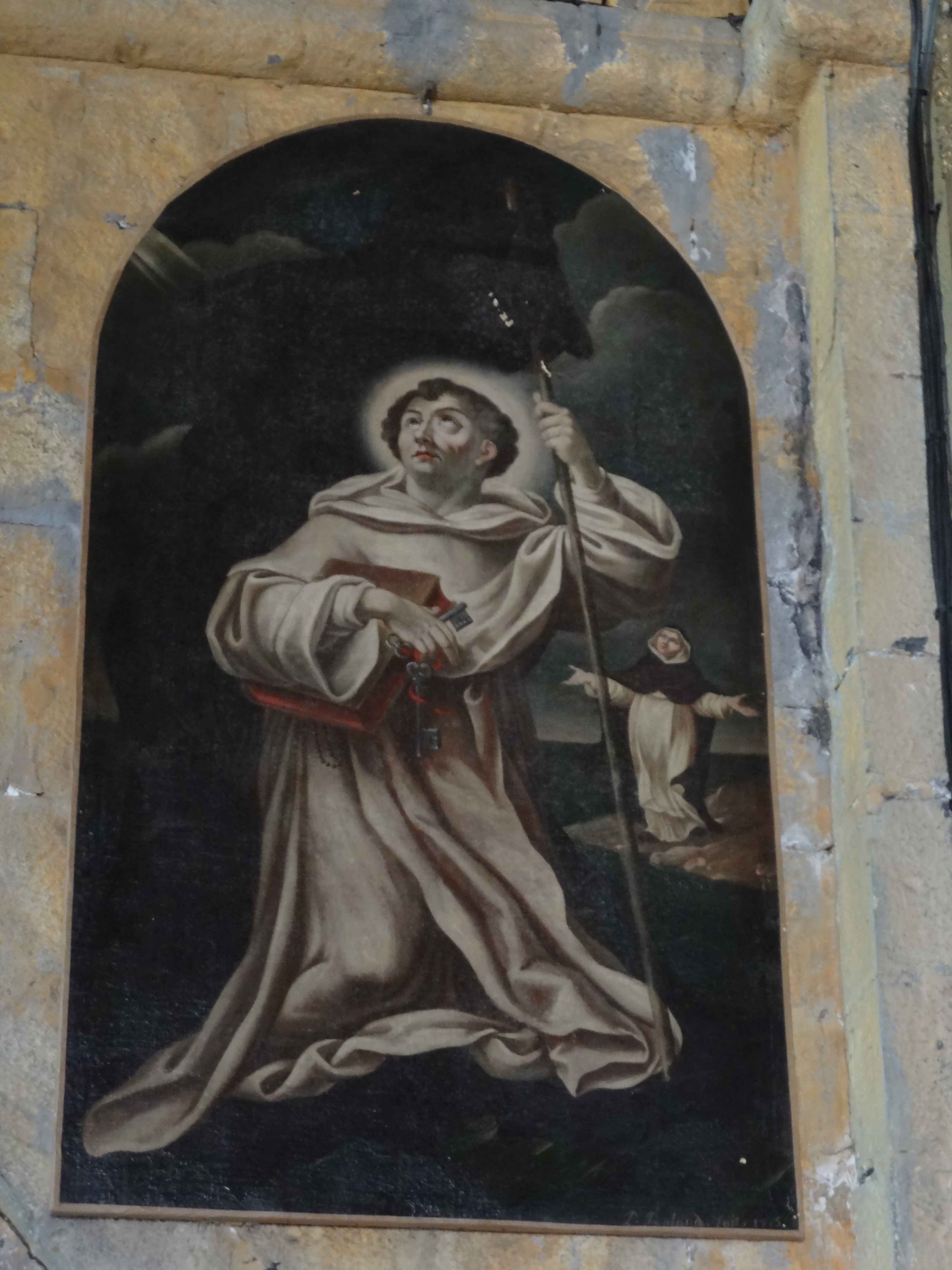 église Notre-Dame-de-Nazareth de Seyne, Alpes-de-Haute-Provence